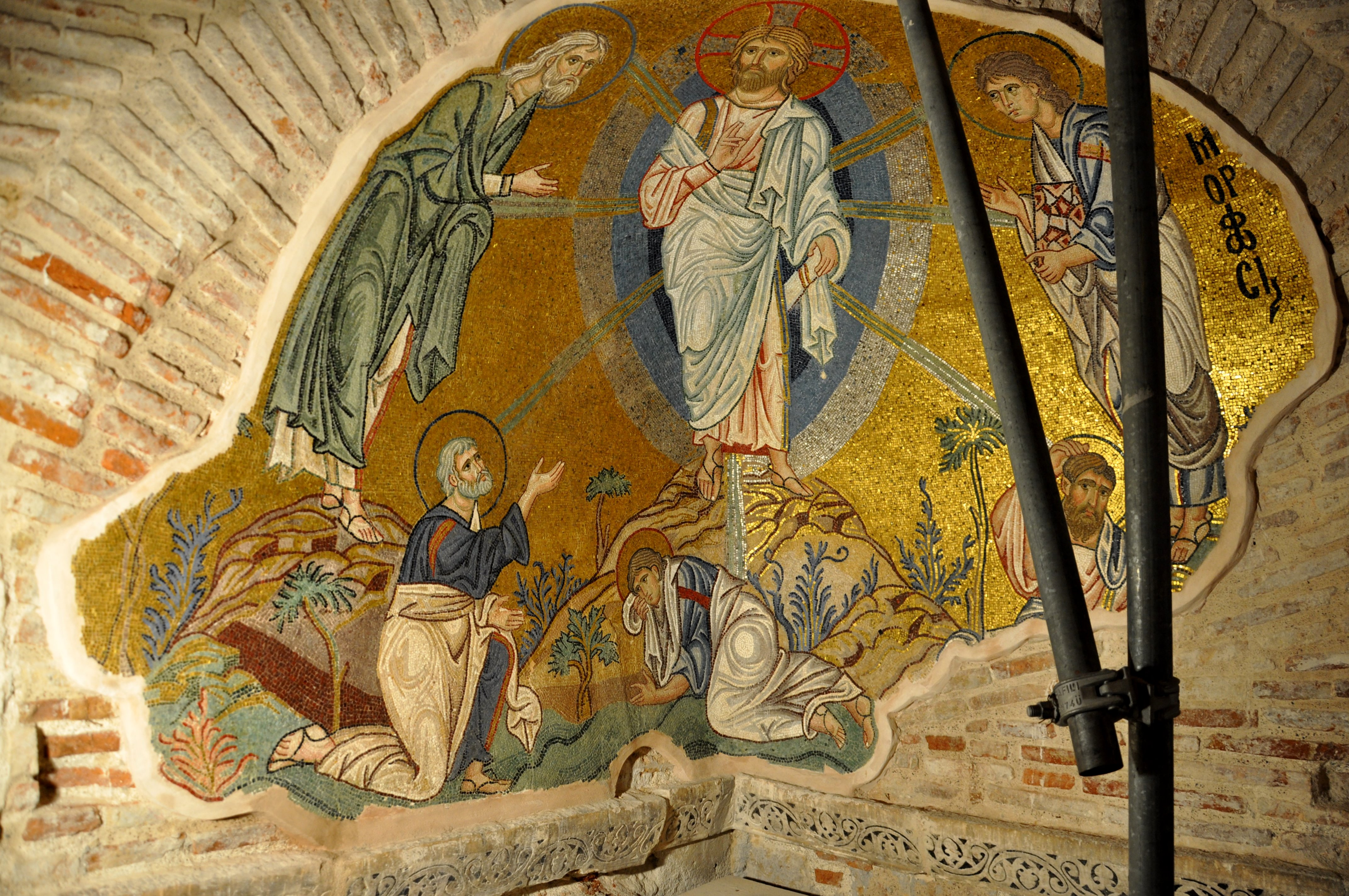 Monastyr w Dafni (na obrzeżach Aten). Przeistoczenie - jedna z mozaik bazy kopuły. Zdjęcie ze stycznia 2011, dzięki nie zdjętym jeszcze rusztowaniom prac zabezpieczających, po trzęsieniu ziemi 1999. Mozaiki powróciły właśnie z pracowni konserwatorskich.